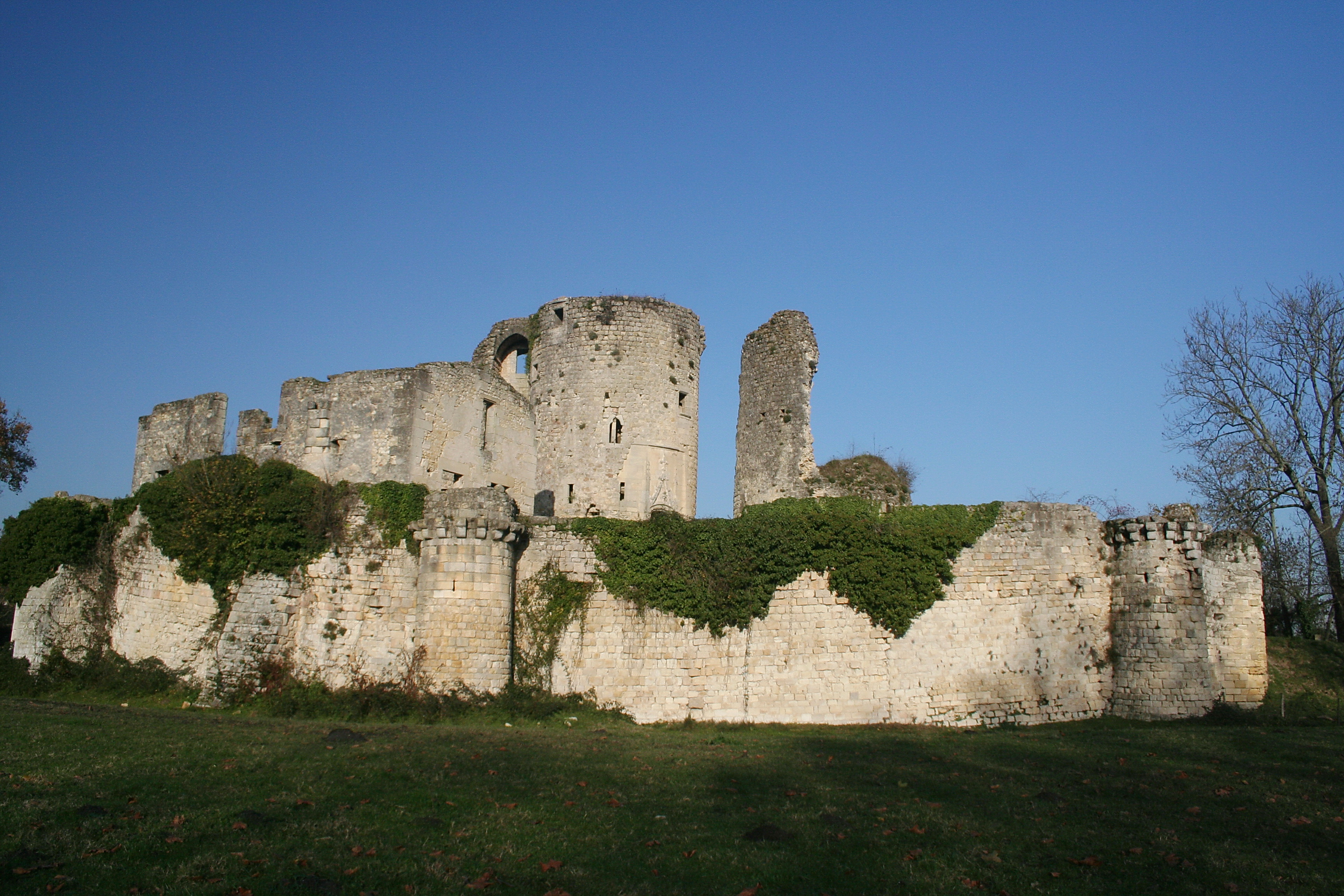 Château de Blanquefort ou Château du Prince noir